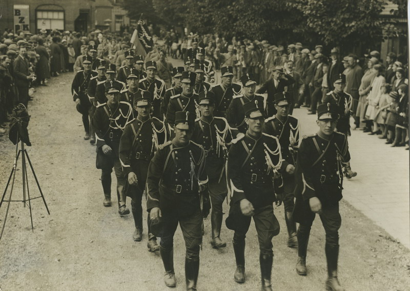 Een detachement van de Koninklijke Marechaussee gevolgd door het detachement van het Remonte Depot passeert Wijchen tijdens de 22e vierdaagse. Let op de microfoon op standaard links.